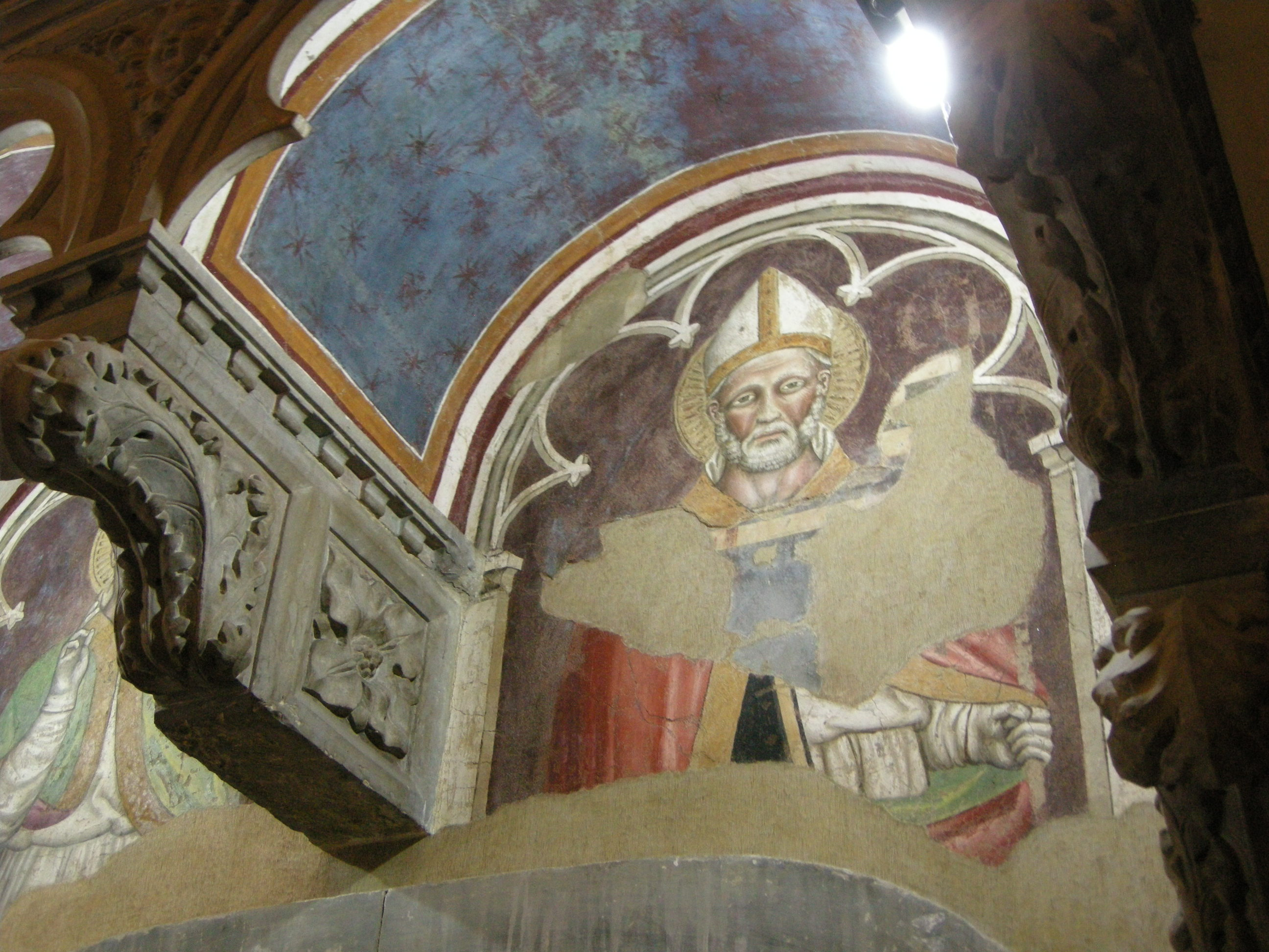 Santo spirito, cappella corsini, tomba del beato neri corsini, sant'andrea corsini di spinello aretino